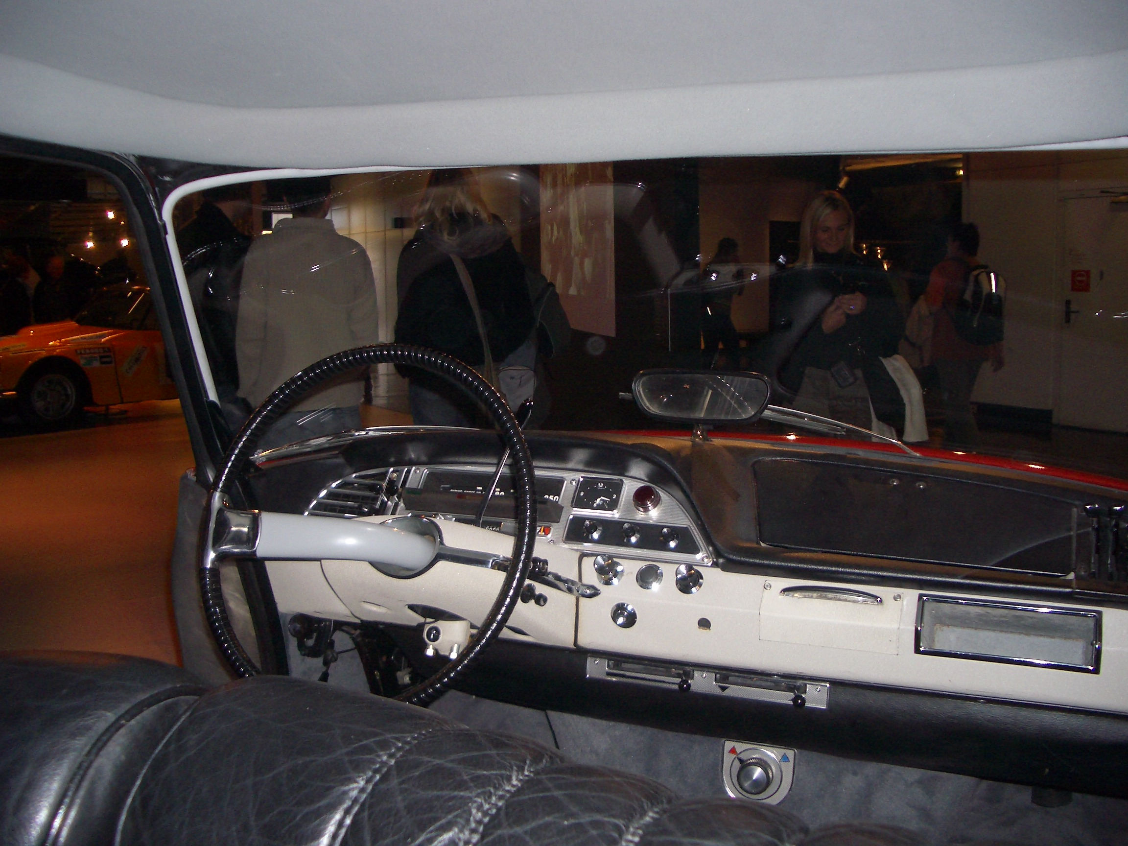 Showroom Citroën Paris